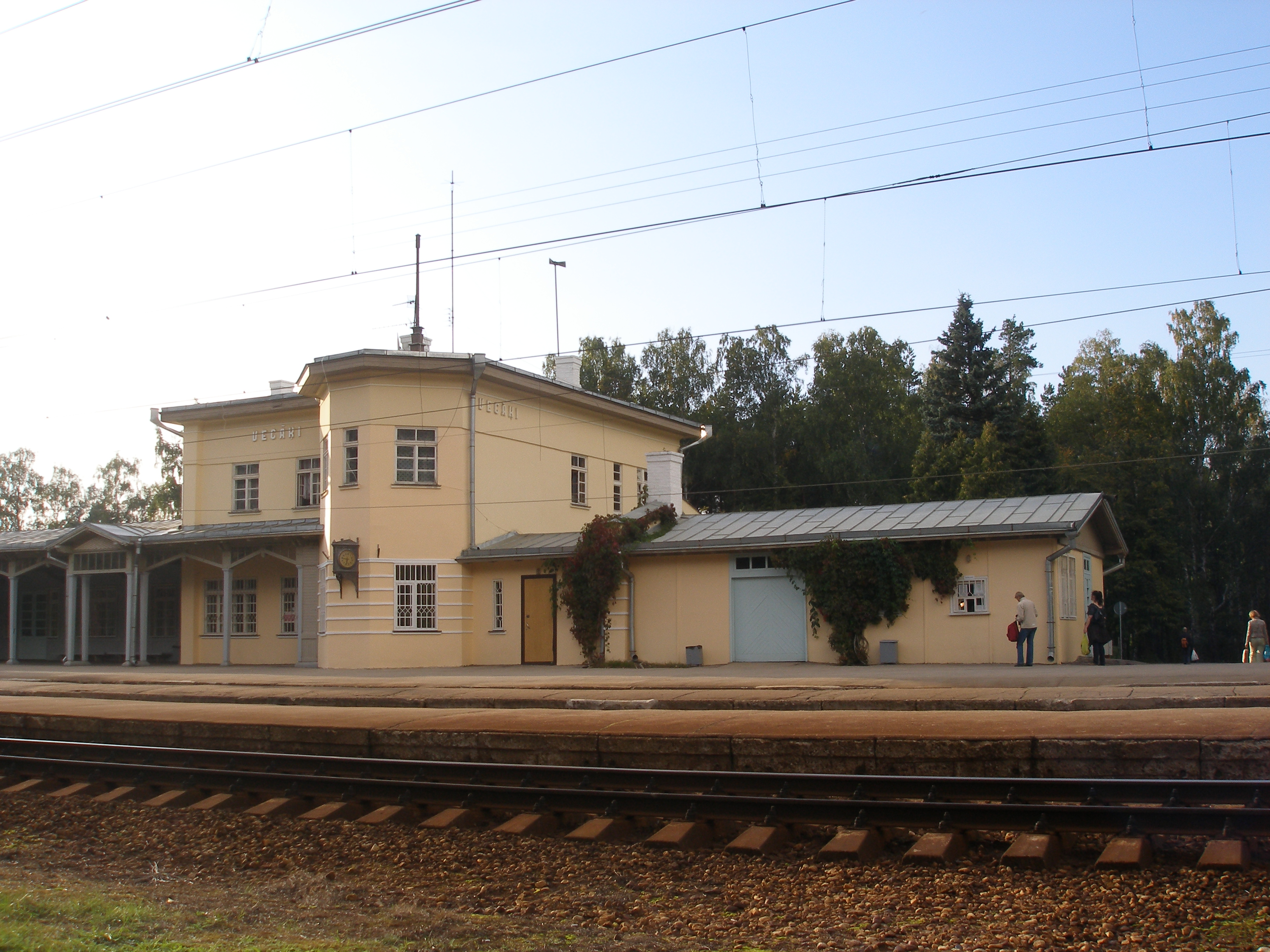 Vecāķu stacijas ēka